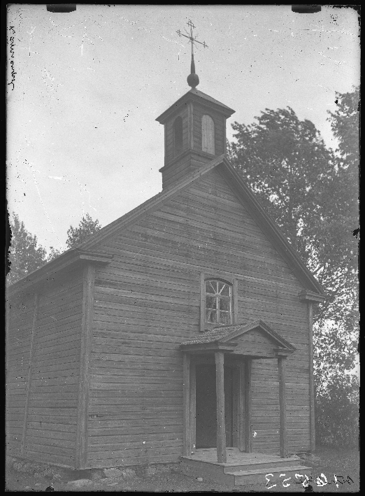 Беларуская (тарашкевіца): Камянпольле (Kamianpolle). Капліца